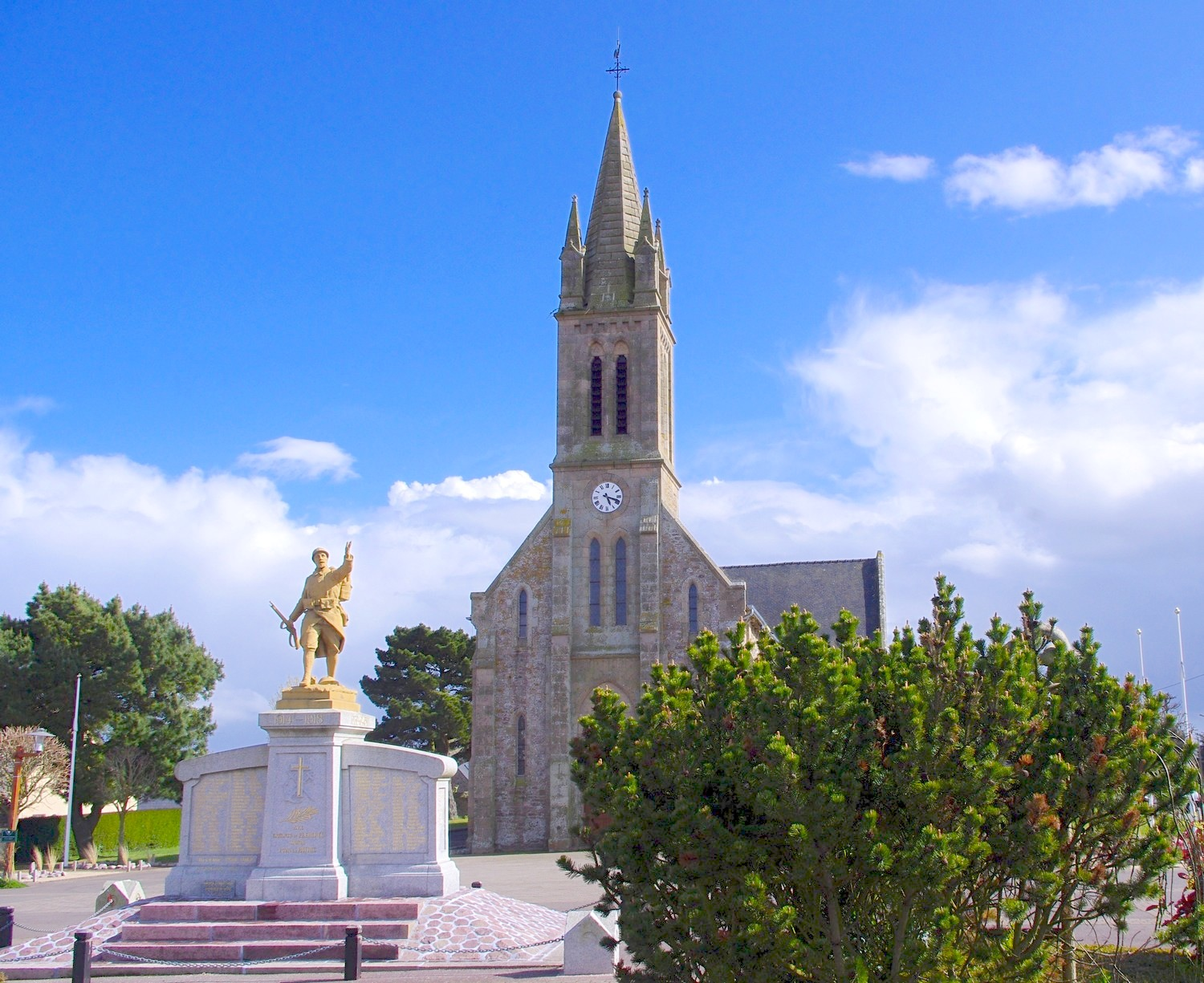 La place Chambly à Fréhel, dans les Côtes d'Armor.